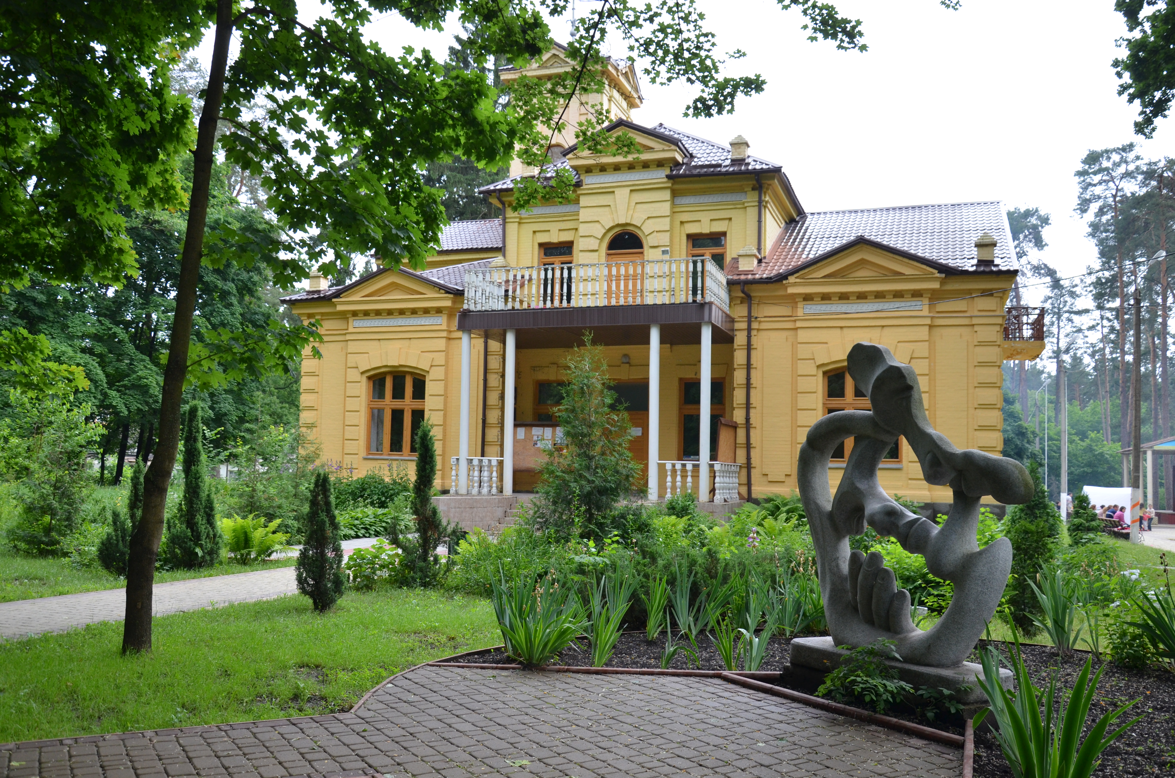 Садибний будинок графині Н.Ф. Уварової, смт Ворзель